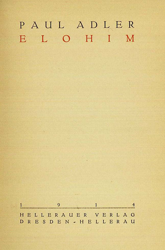 Elohim